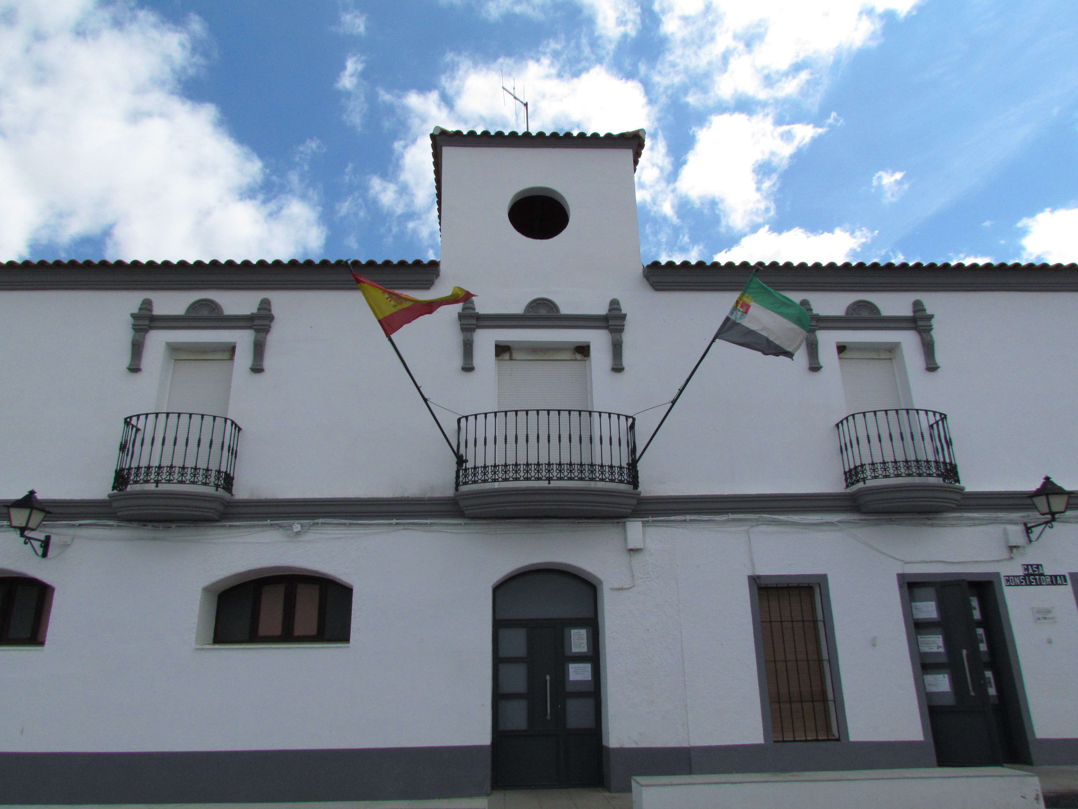 Ayuntamiento y Salón Cultural